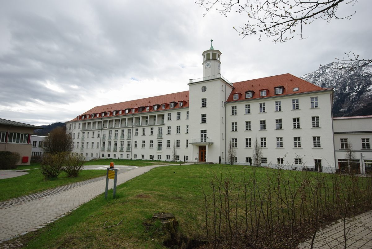 Schachnerbau, Riedelstr. 5, 83435 Bad Reichenhall